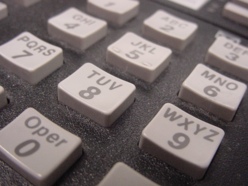 Phone keypad